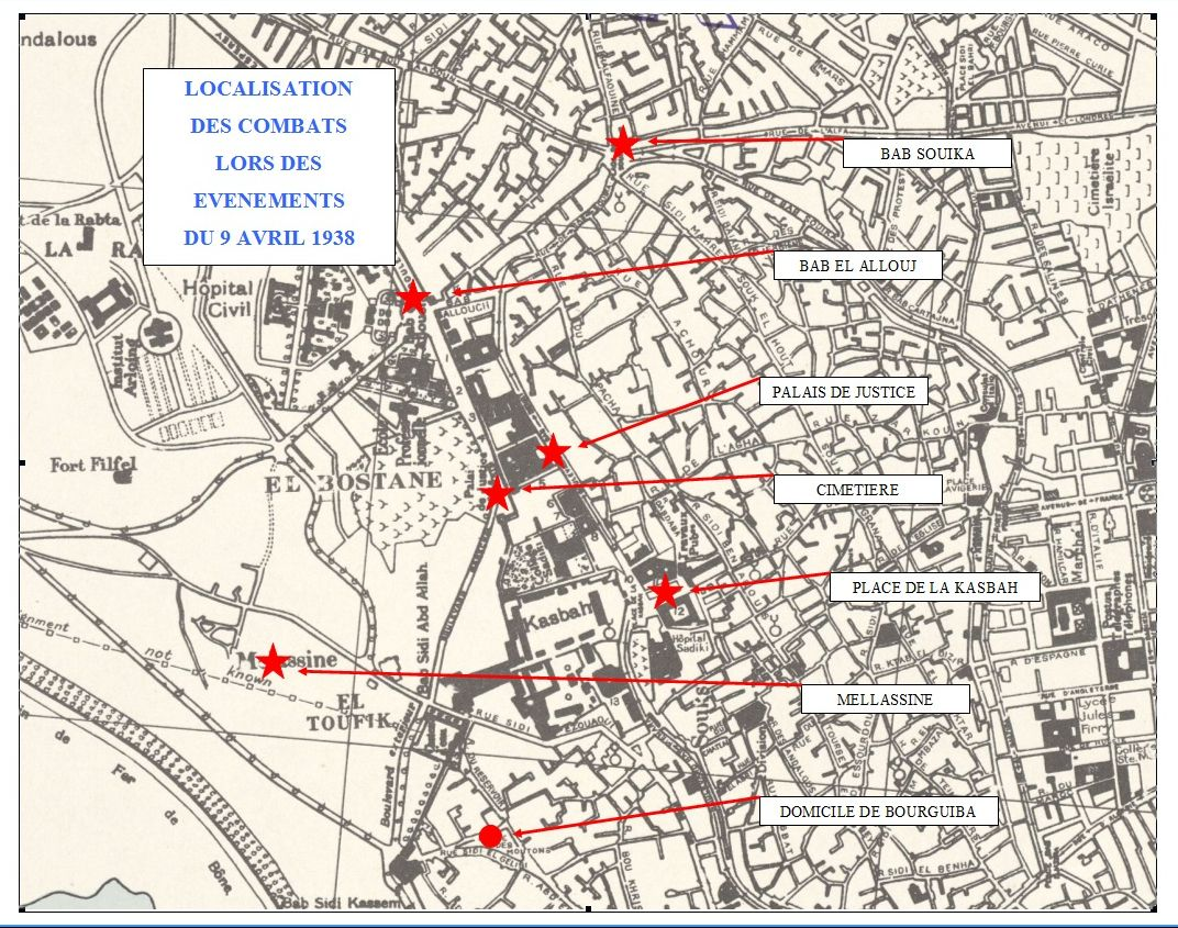 Localisation des combats lors des évènements du 9 avril 1938 à Tunis